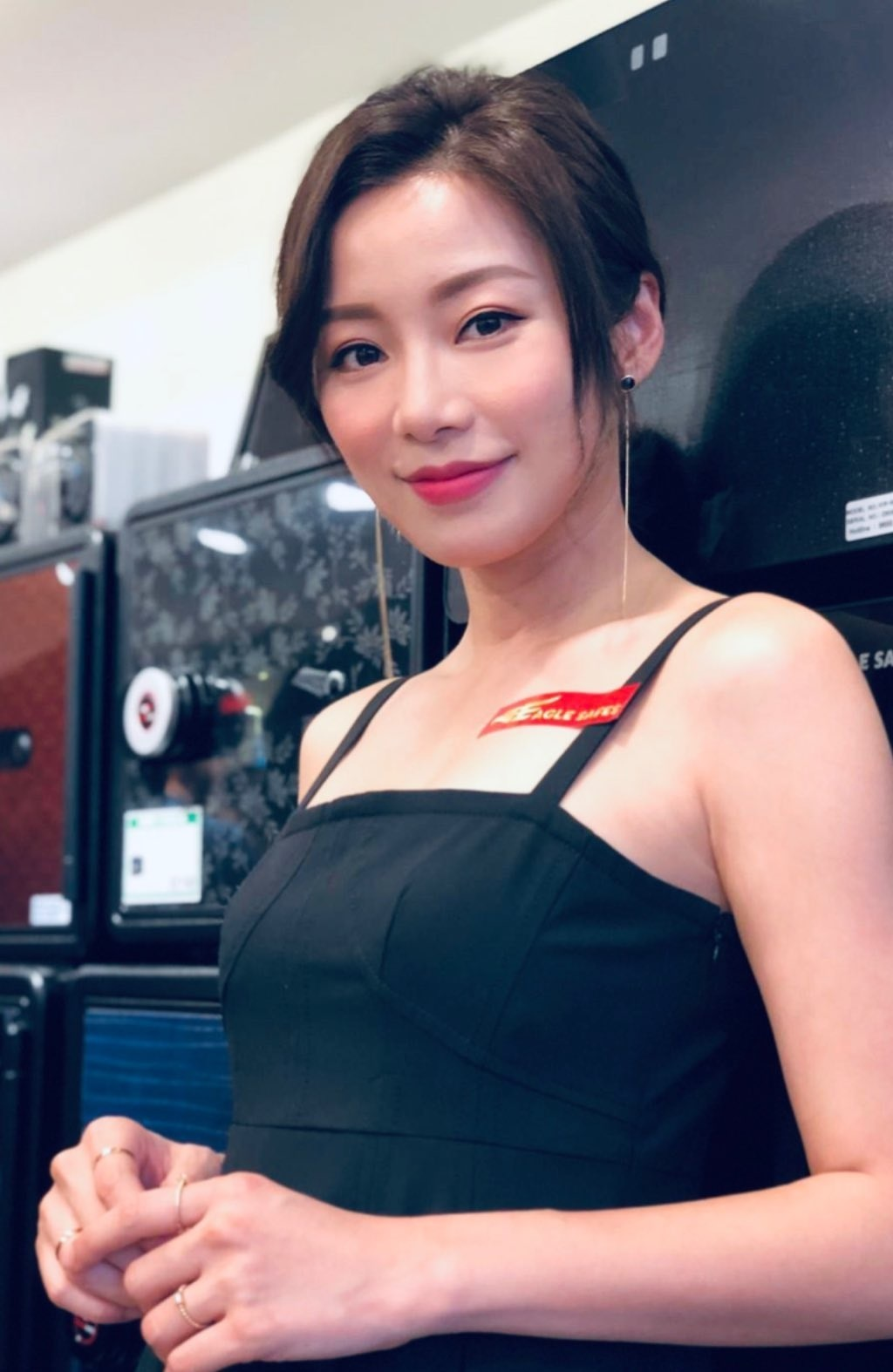 鷹金庫夾萬元朗分店喬遷活動